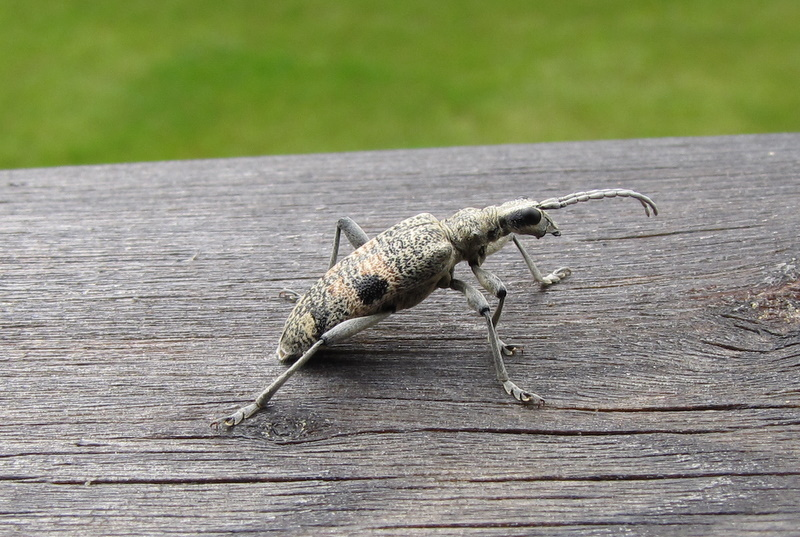 Bartreløper (Rhagium mordax) sett fra siden